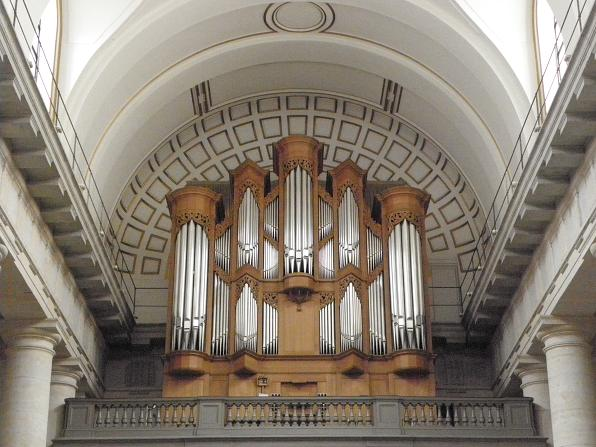 Grandes-orgues de l'église N.D. St-Vincent de Lyon (69)